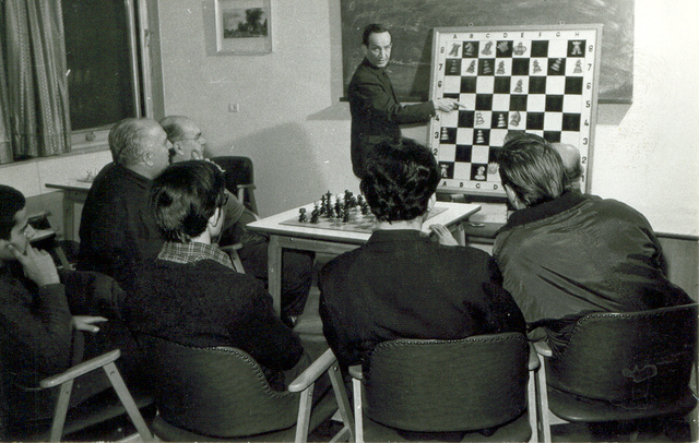 A sakk-kör „munka” közben a József Attila Kultúrházban (Magyarország, 1131 Budapest, József Attila tér 4.)